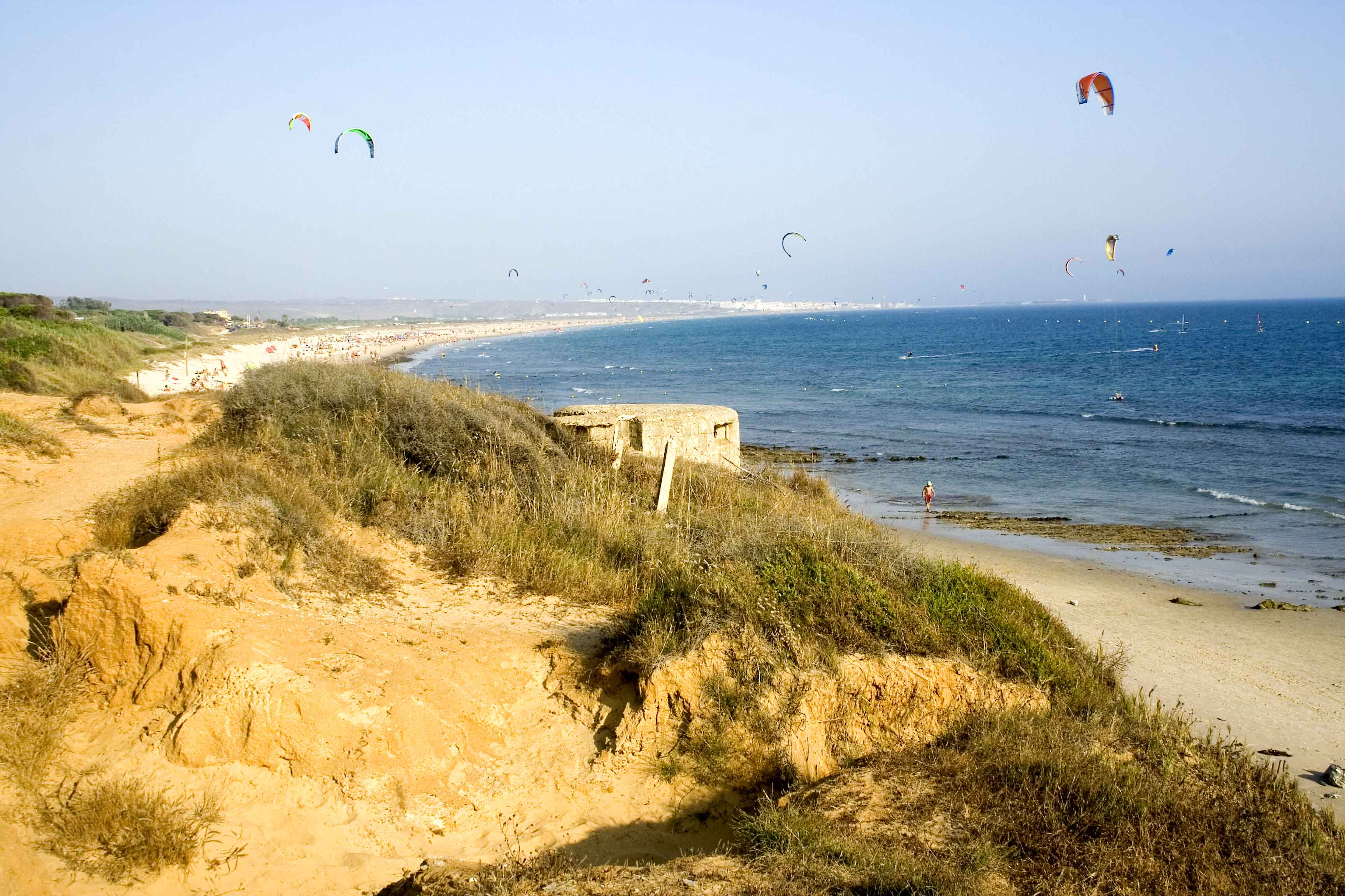 Fortín militar español en la Playa de los Lances (al fondo, Tarifa- South of Spain) c. 1941bunker-2